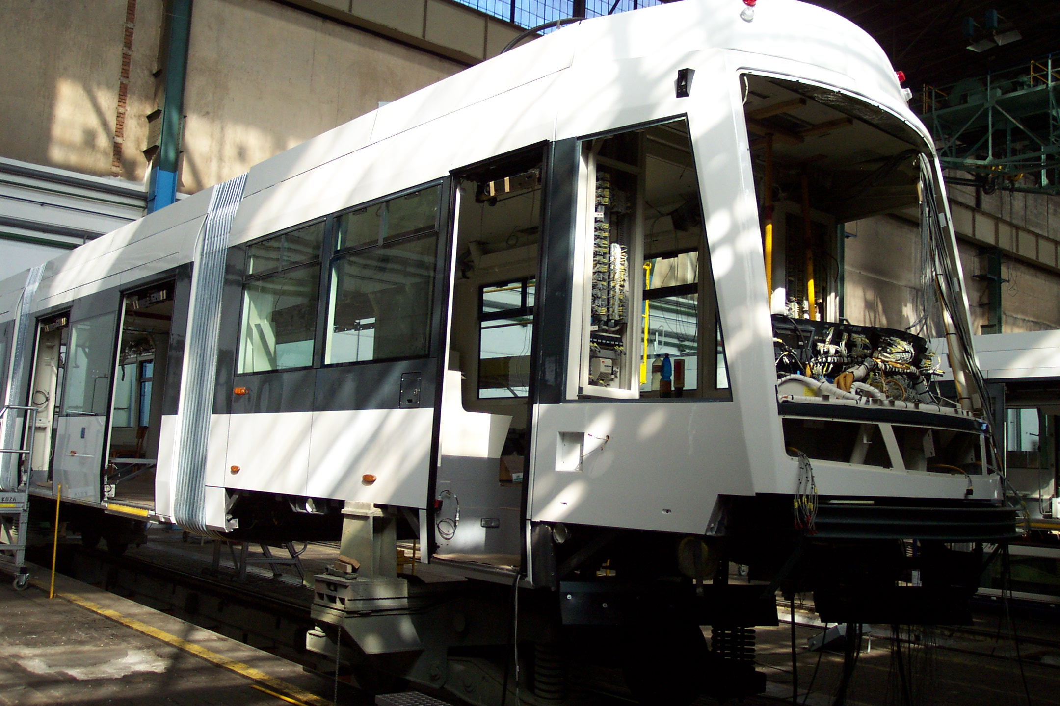 Plzeň, the unfinished tram in Škoda factory - Plzeň, nedokončená tramvaj vyráběná v továrně společnosti Škoda